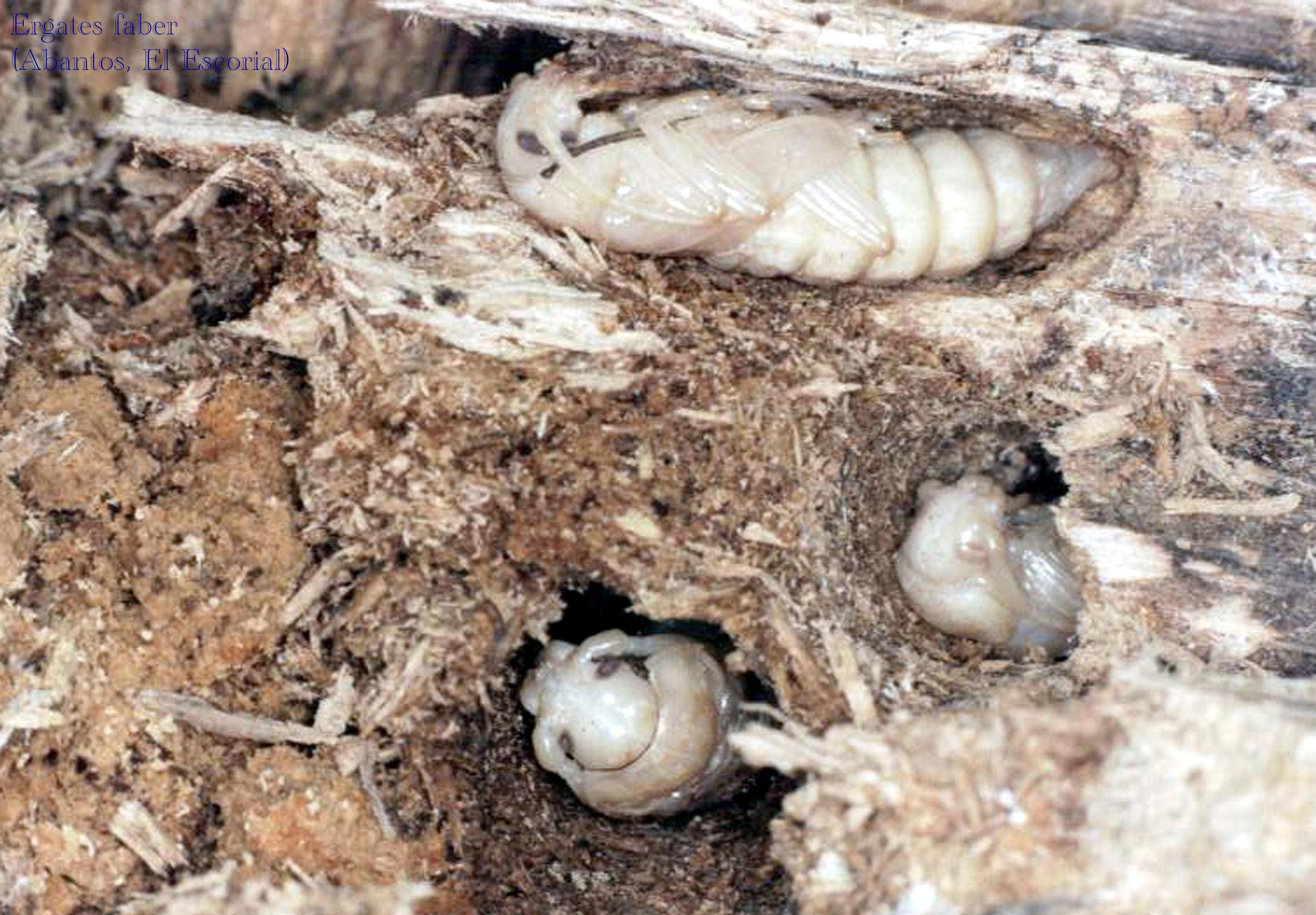 Ninfas de Ergates faber (Linneo, 1761) (Coleoptera, Cerambycidae, Prioninae) alojadas en sus cámaras en madera muerta de pino silvestre. Fotografía tomada en la cabecera del valle del río Lozoya, Sierra de Guadarrama, Madrid. Autor: José Manuel Echevarría)